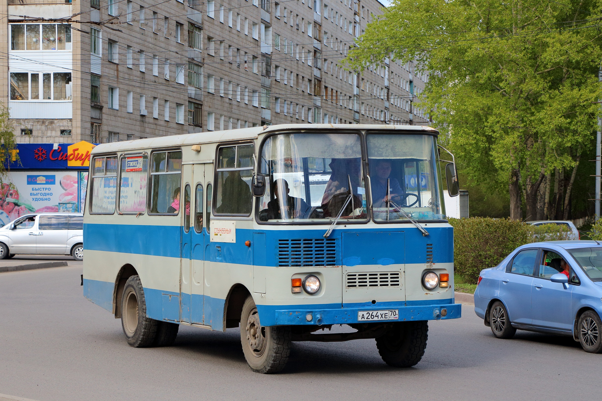 Служебный автобус Таджикистан-3205 в Томске